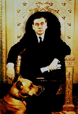 Arturo Alessandri Palma (1868 - 1950) Presidente de la República de Chile en dos periodos (1920-1925, 1932-1938). Fotografía de su segundo periodo presidencial, junto a su perro gran danés "Ulk"